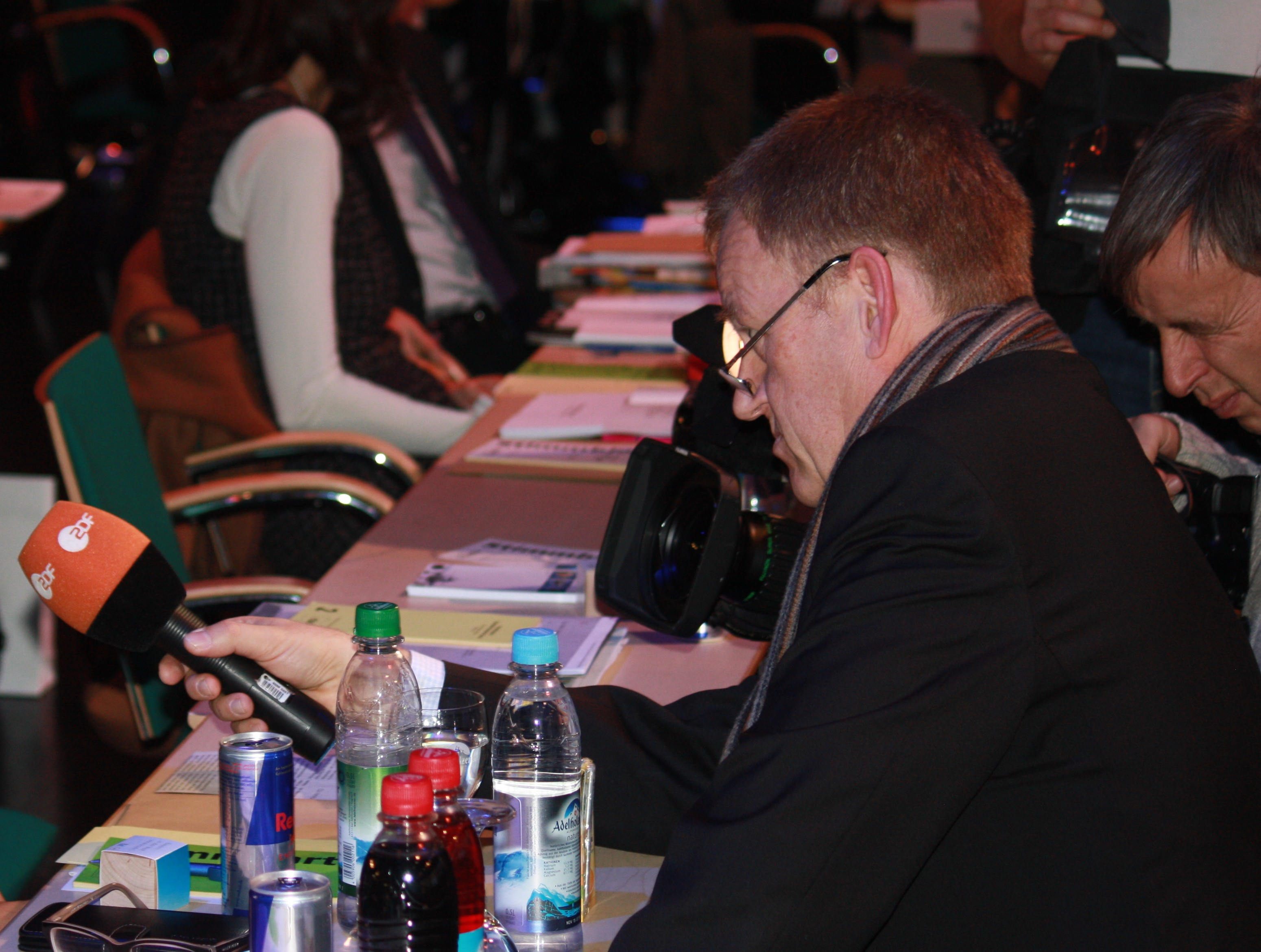 ZDF Interview auf dem CSU-Parteitag am 12. Dezember 2014 in Nürnberg